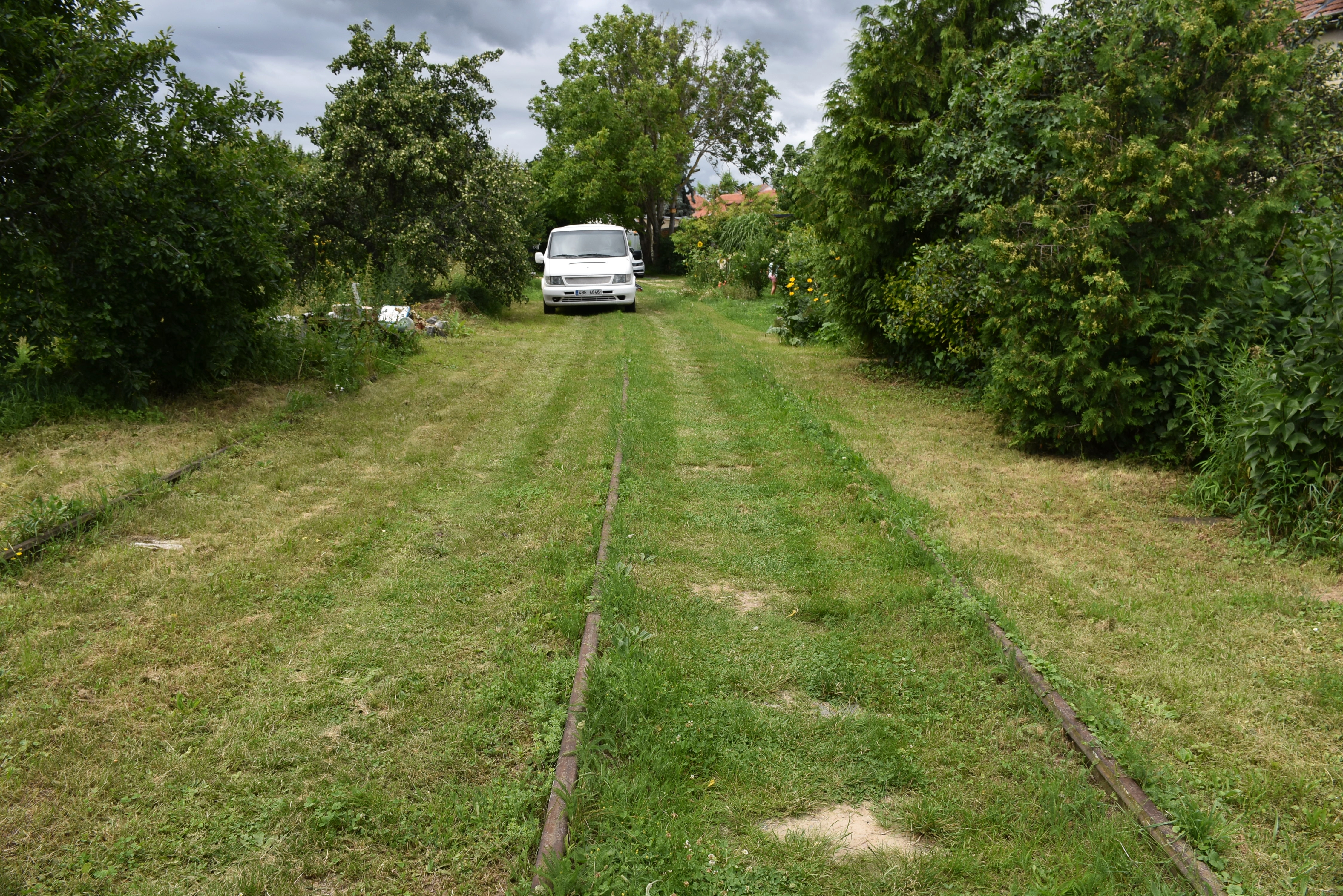 Současný stav TT v Líšni hned vedle zahrad obytných domů. Lze vidět využívání trati obyvateli.